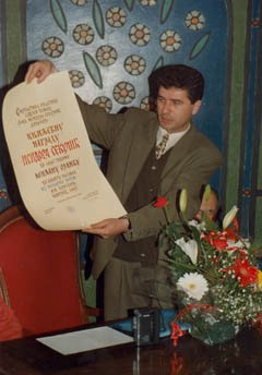 Фотографија са уручења нагреде "Исидора Секулић" (1995.)